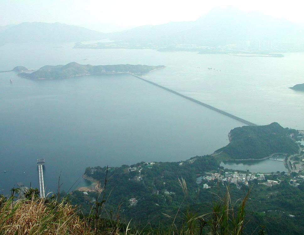 香港船灣淡水湖